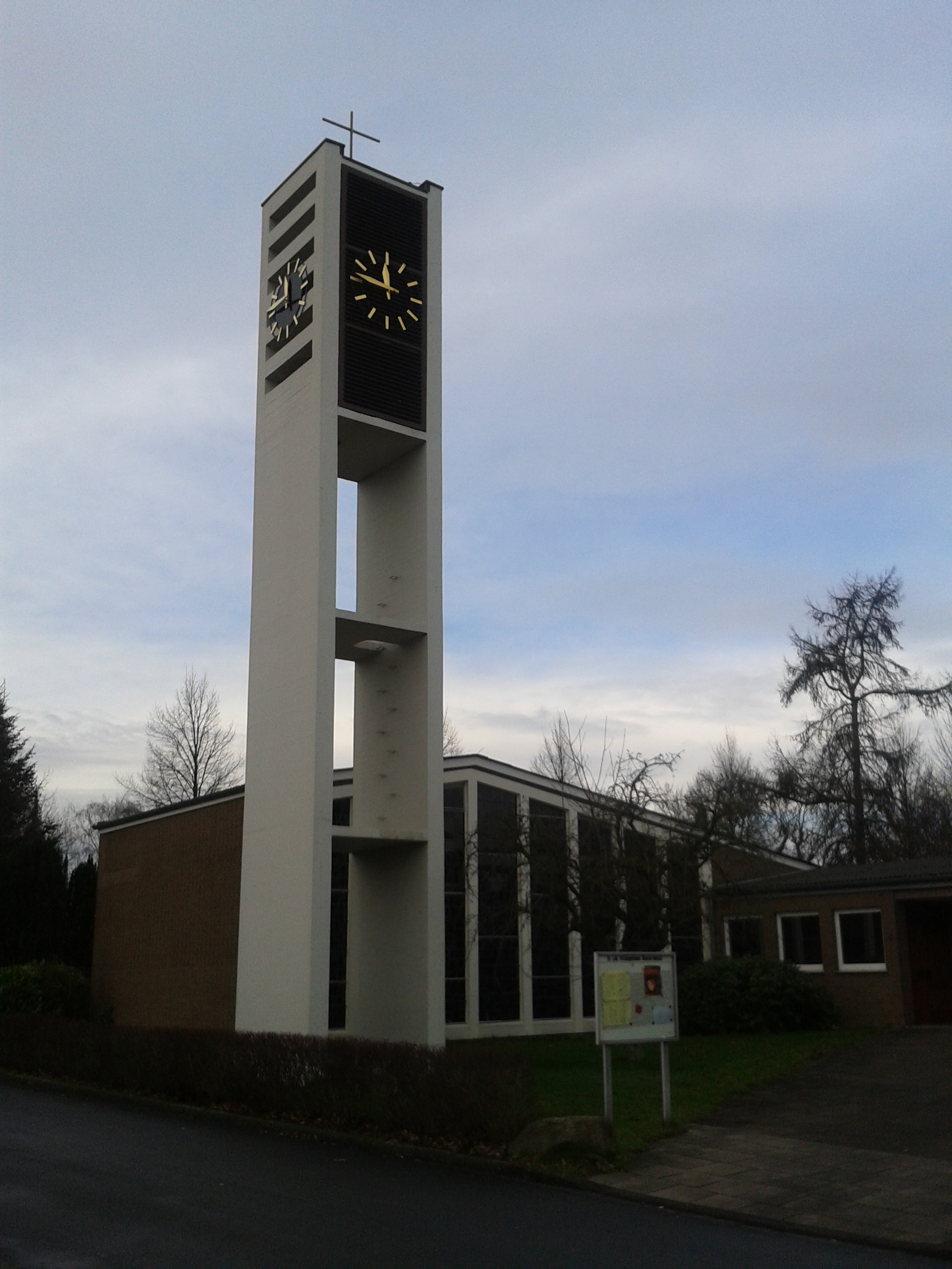 Die evangelische Kirche in Ahmsen.